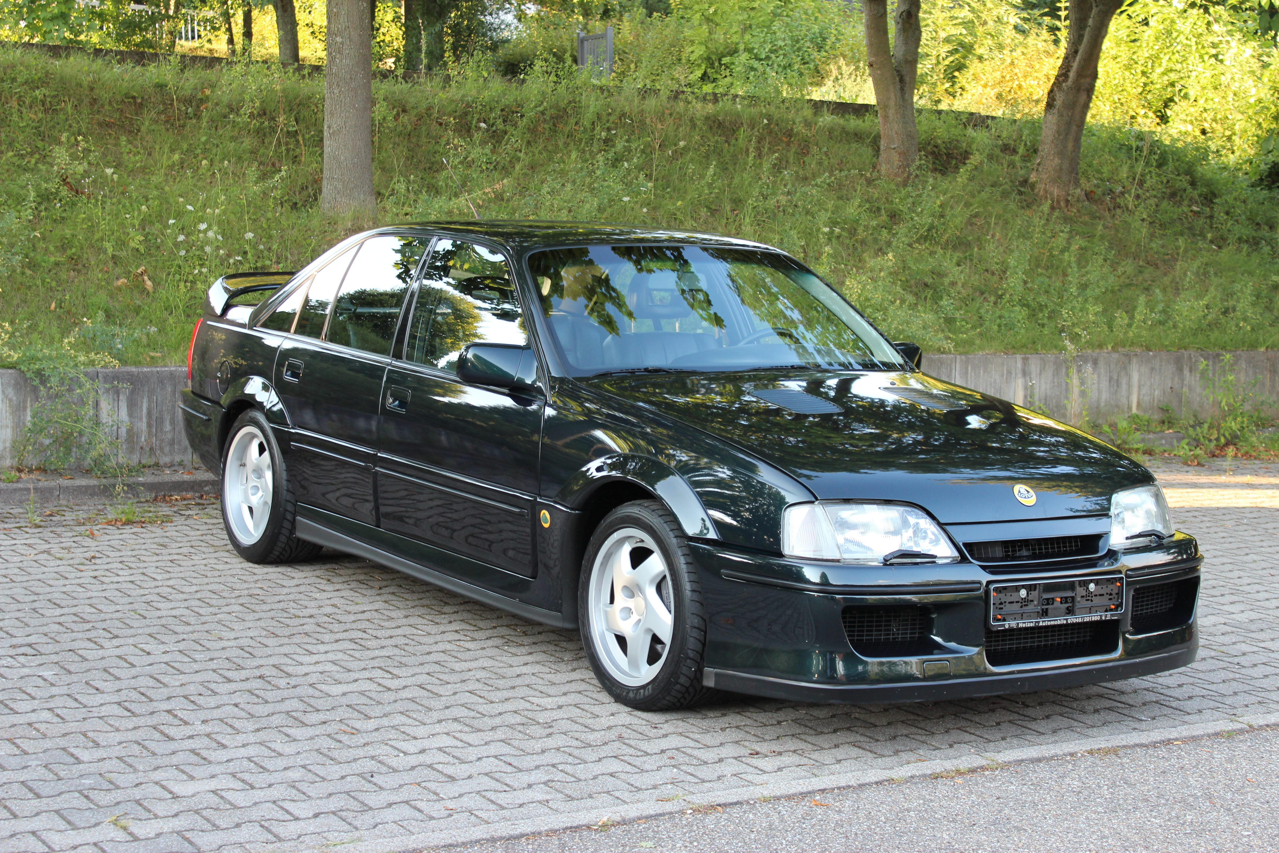 Zeigt den Lotus Omega schräg von vorne